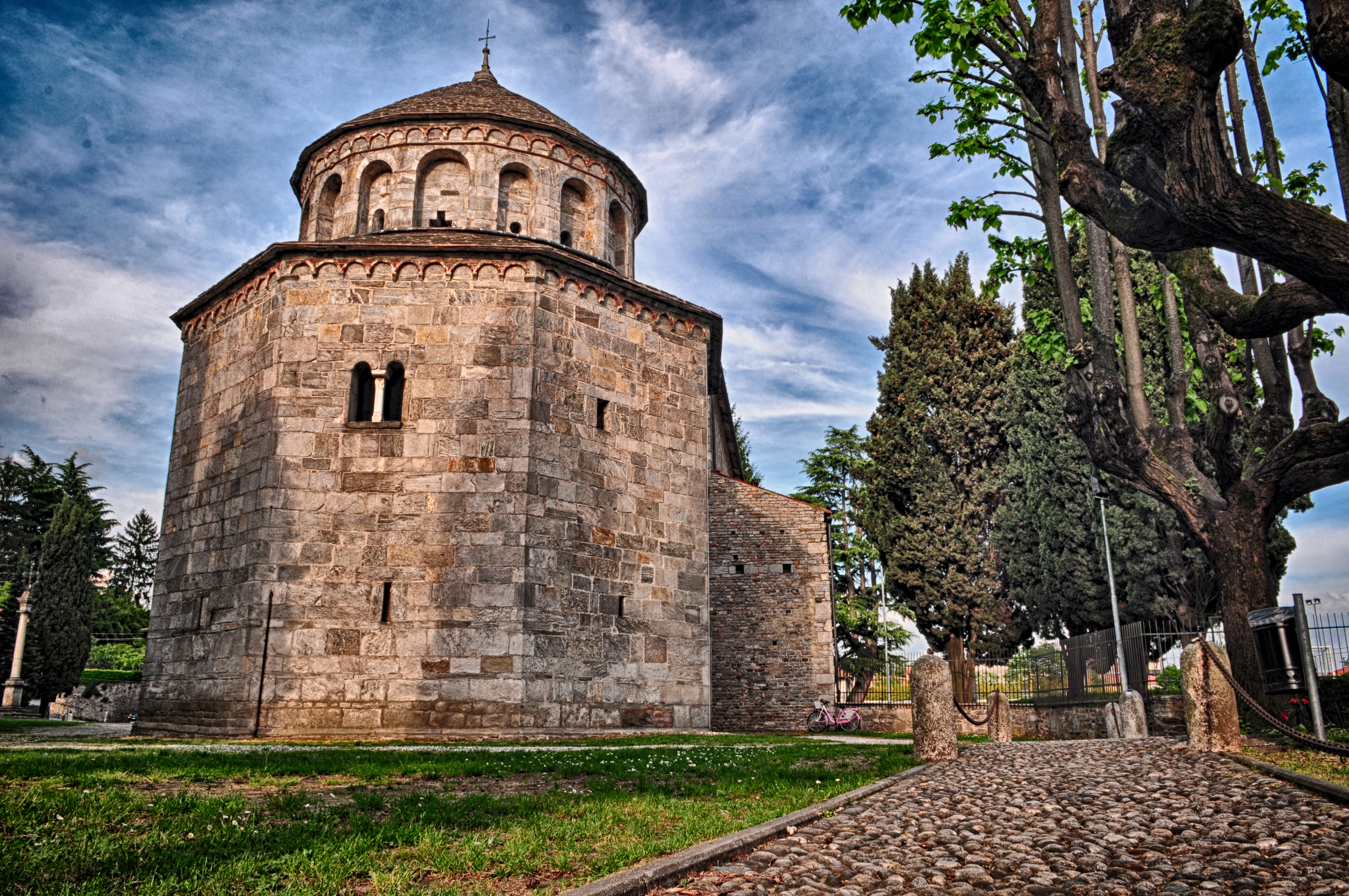 Battistero di San Giovanni This is a photo of a monument which is part of cultural heritage of Italy.